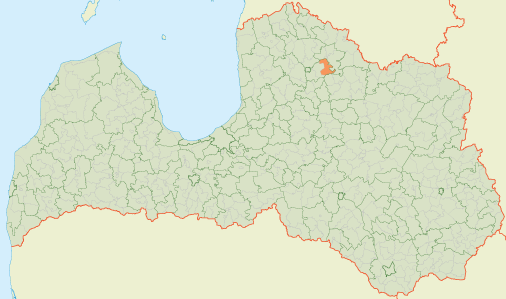 Kategorija:Trikātas pagasts Kategorija:Latvijas pagastu kartes